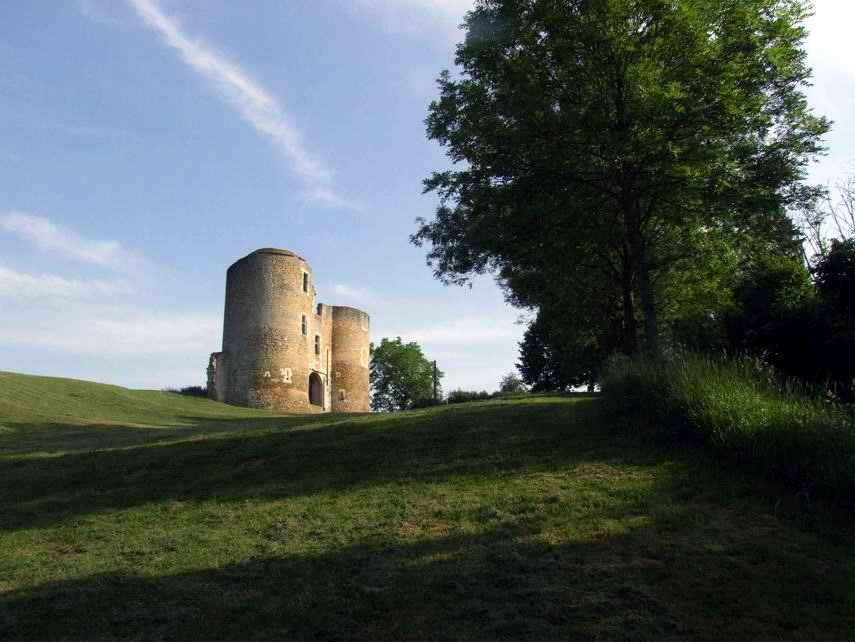 Ruines Levroux